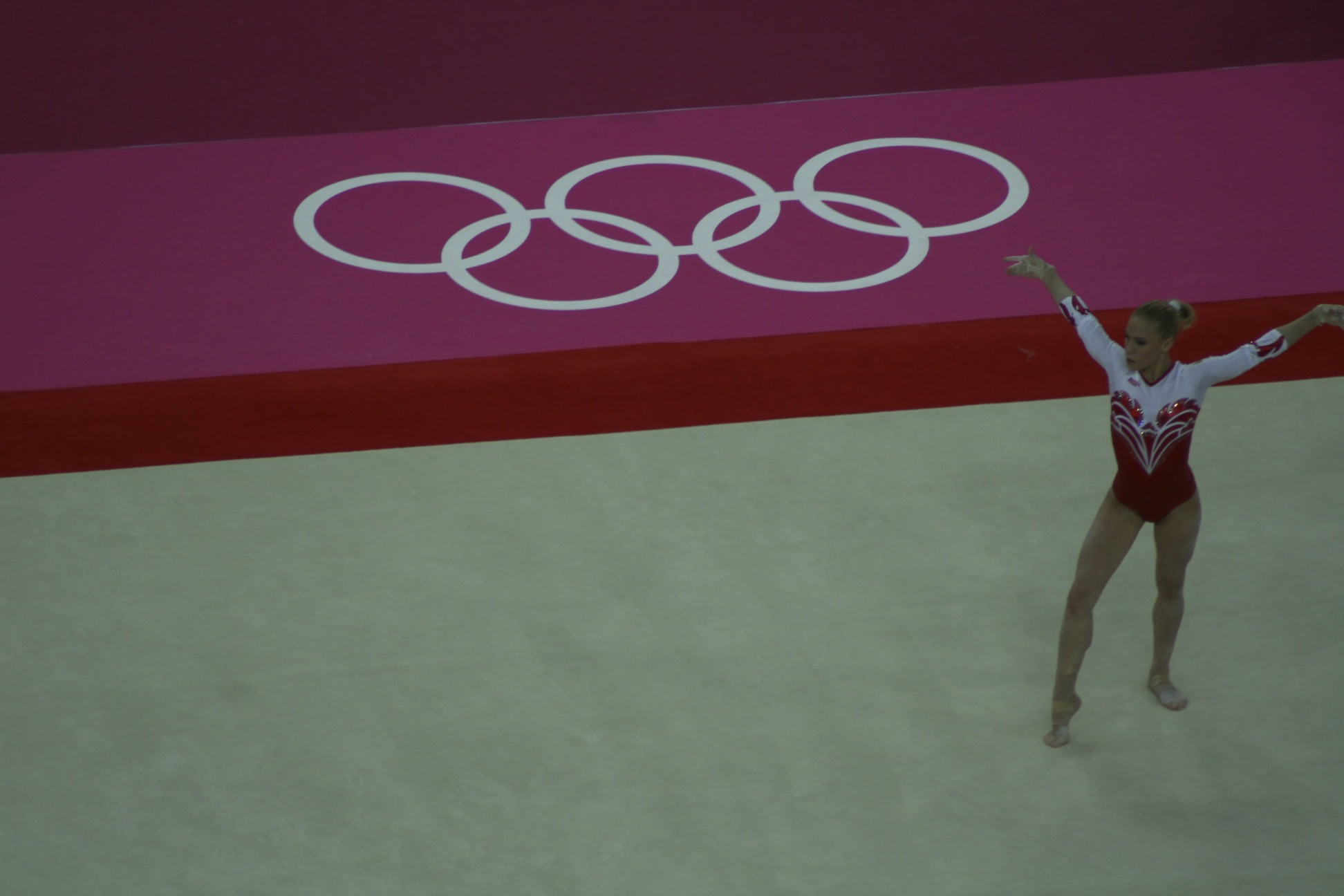 Ksenia Afanasyeva